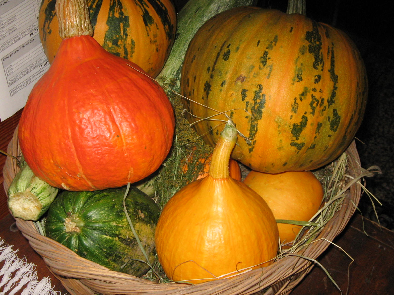 Buče Quelle: eigene Aufnahme 19 09 2005 Fotograf: Janez Novak, Ljubljana, Slovenija